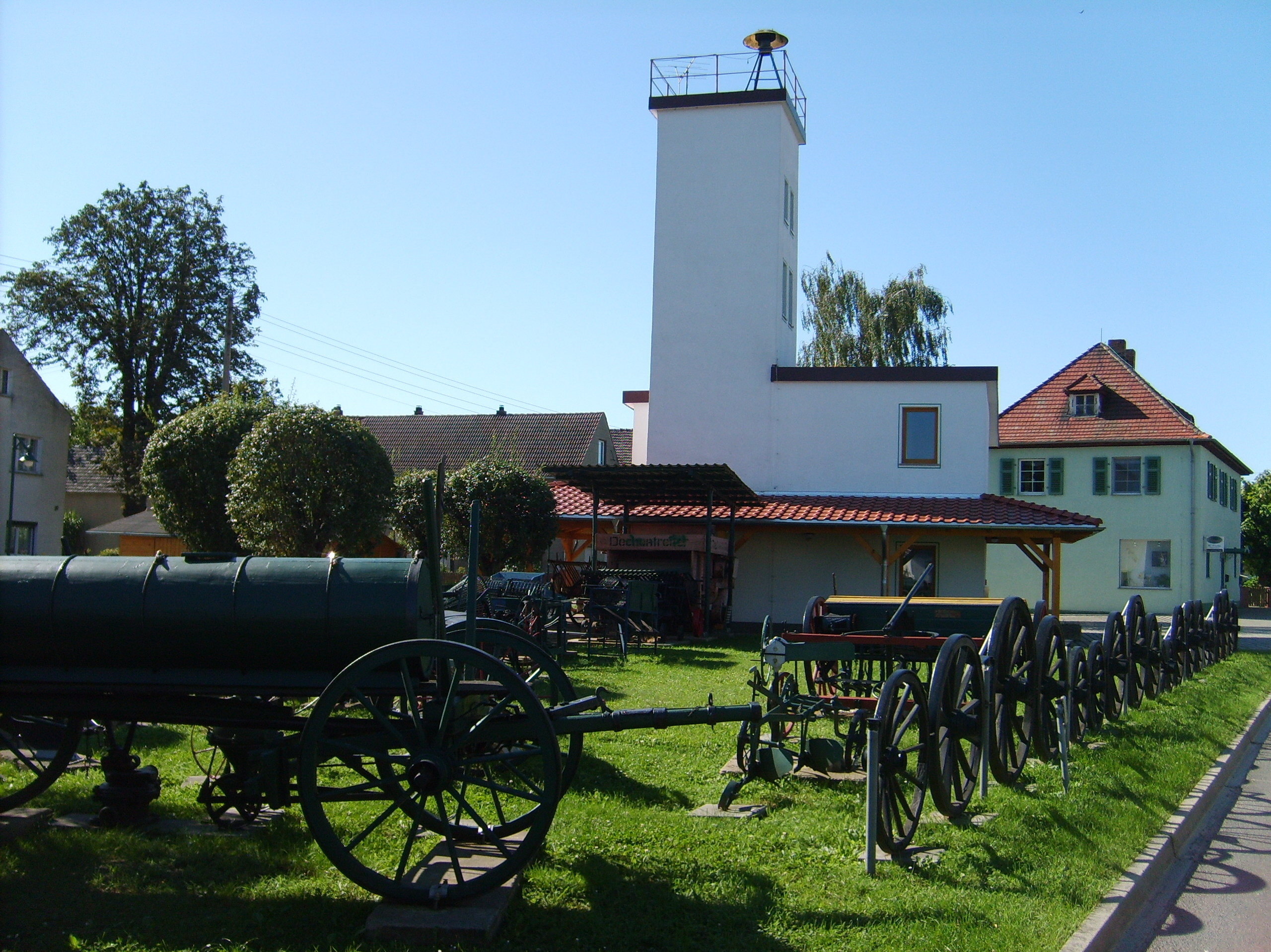 Hirschfeld